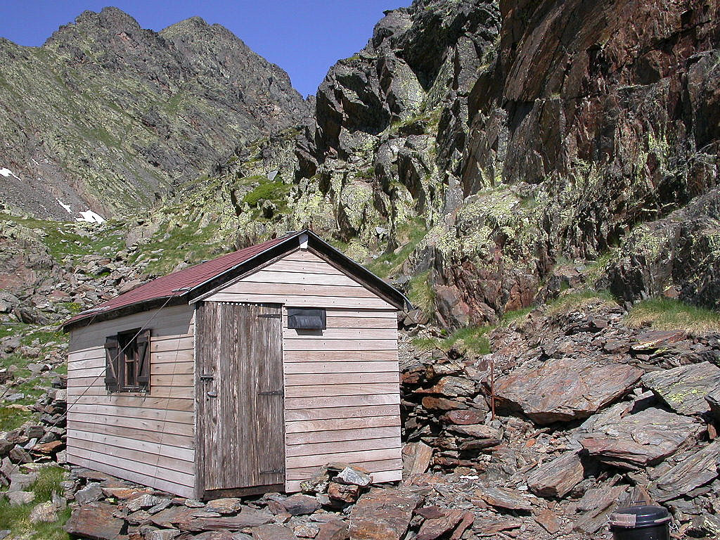 Refuges Andorre Refugi d'Estanys Forcats